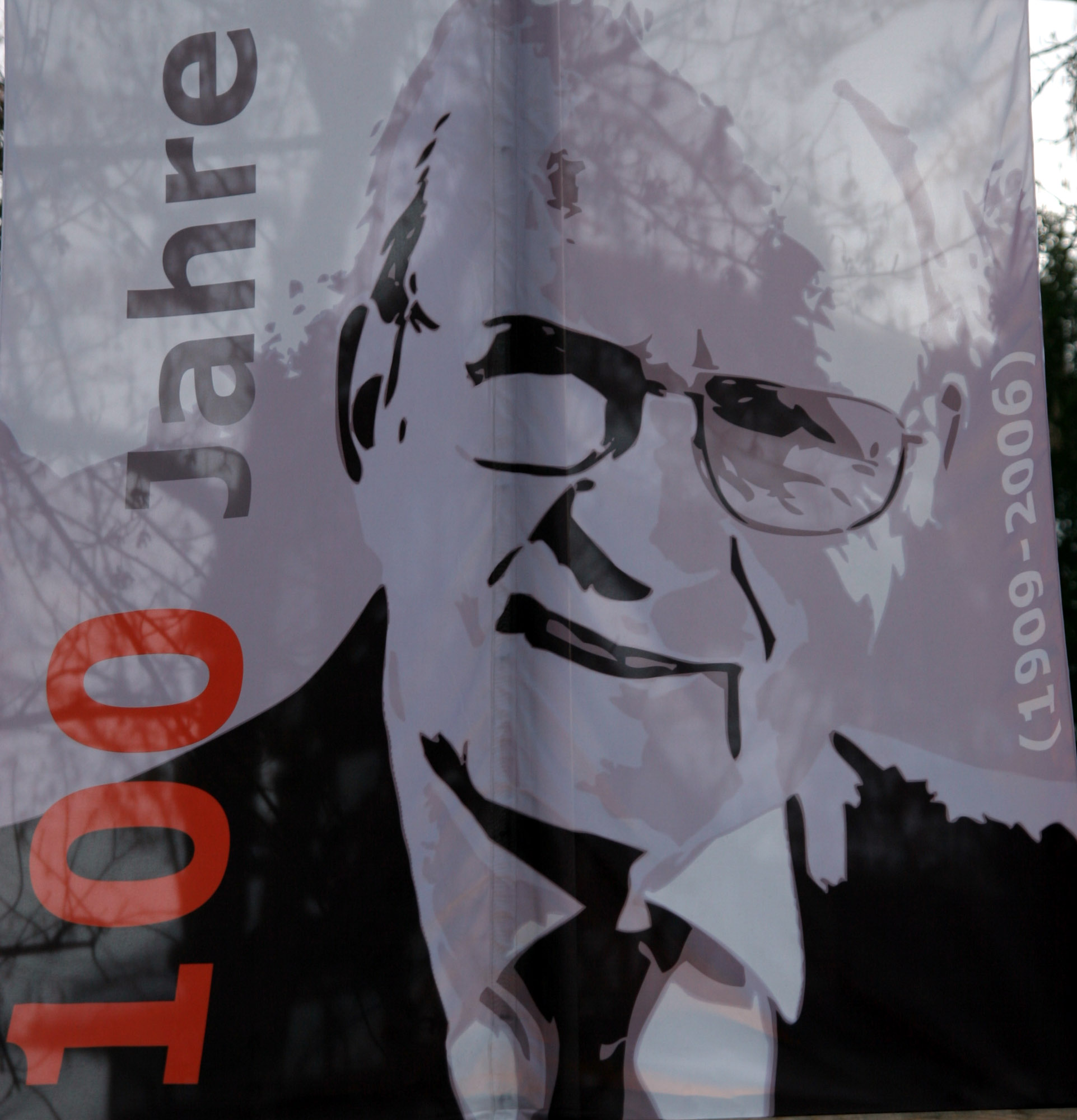 Karl Kübel (1909—2006), auf einer Fahne vor dem Gebäude der Karl-Kübel-Stiftung, in der Darmstädter Straße 100, in 64625 Bensheim